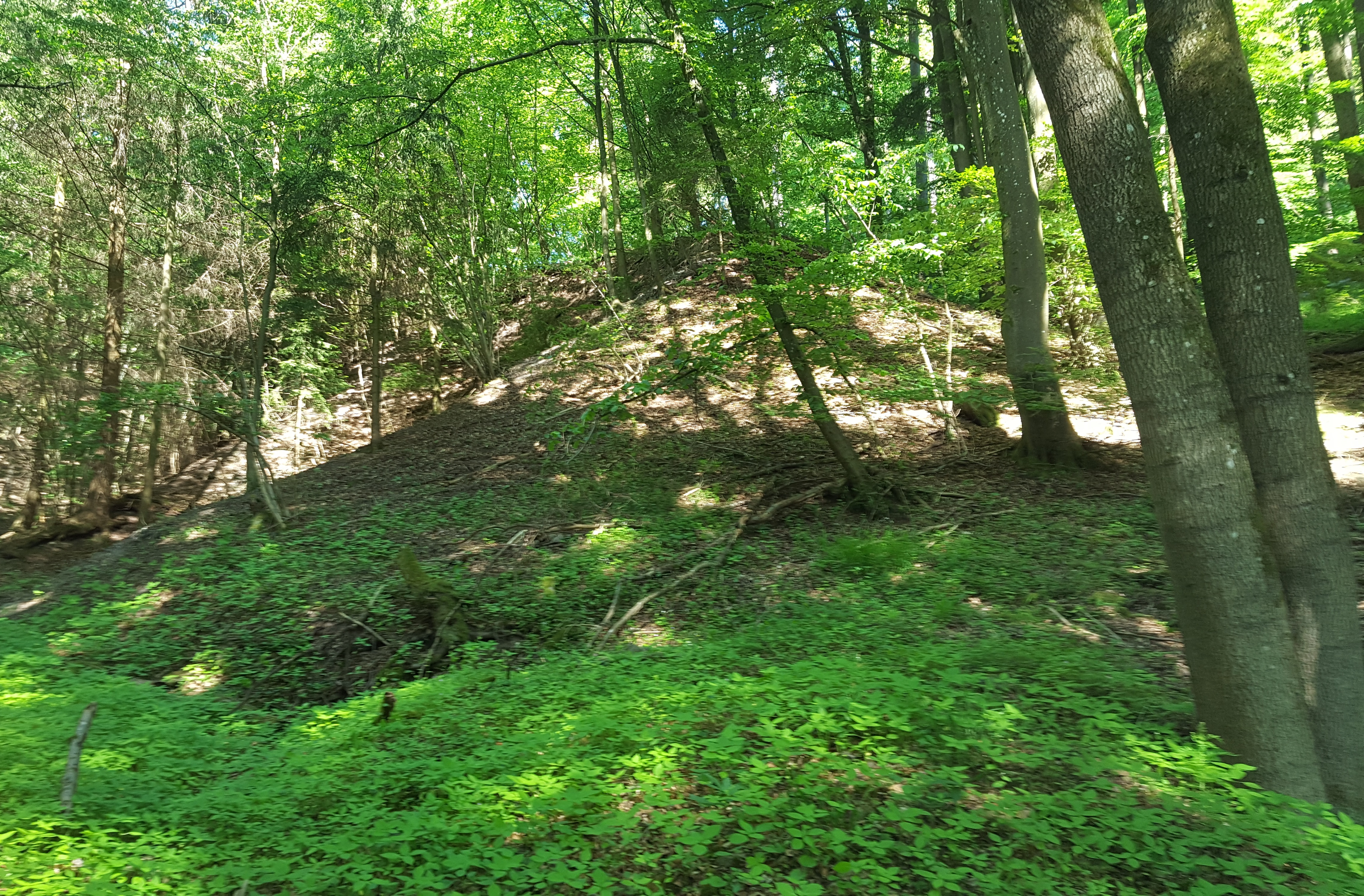 Halde der Grube Gute Hoffnung bie Haiger-Langenaubach